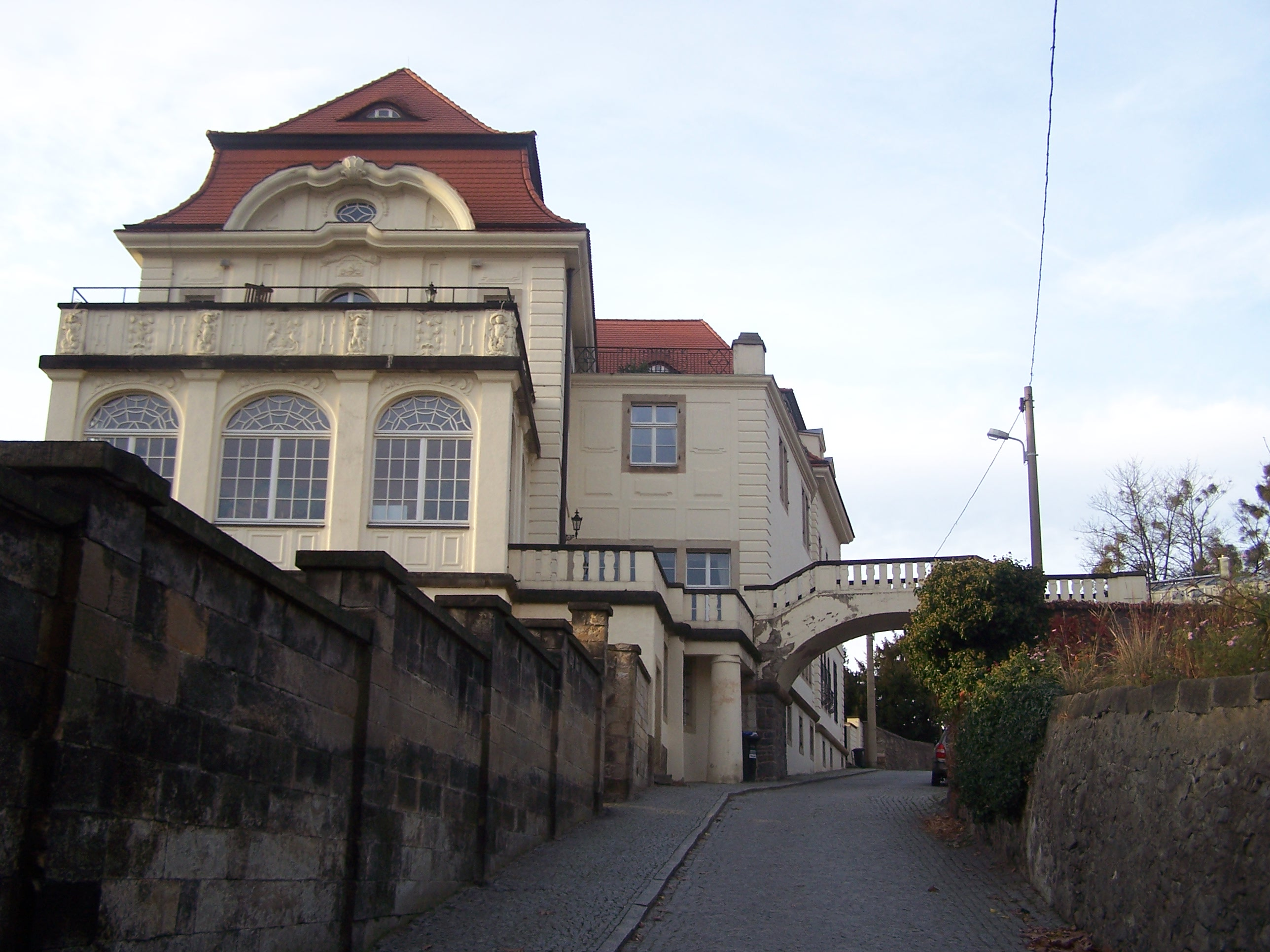 Villa Wollner in Dresden-Wachwitz